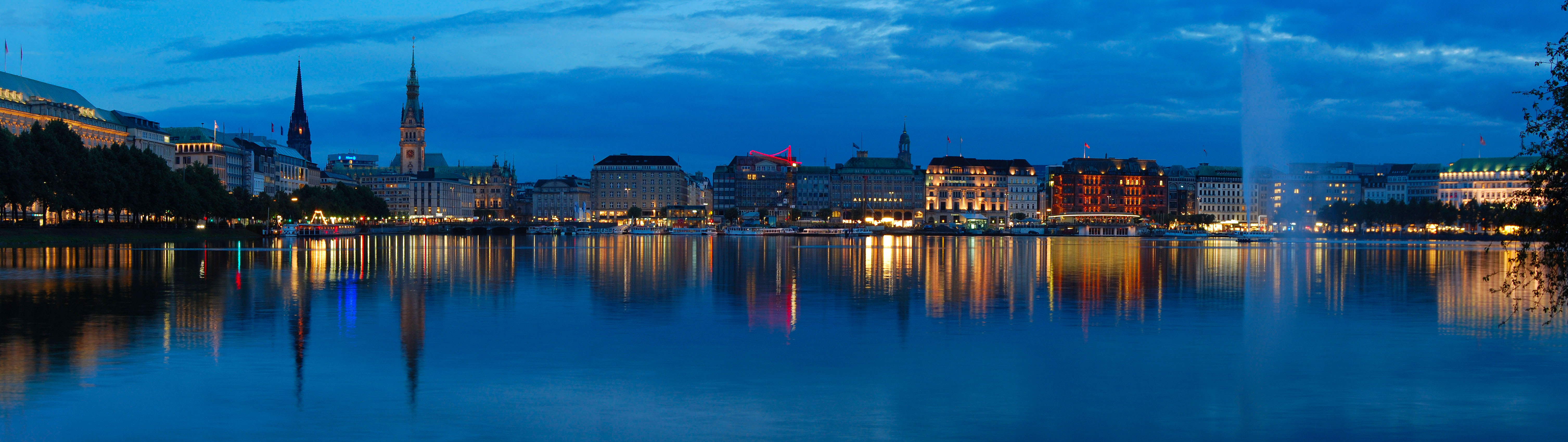 Alsterpanorama